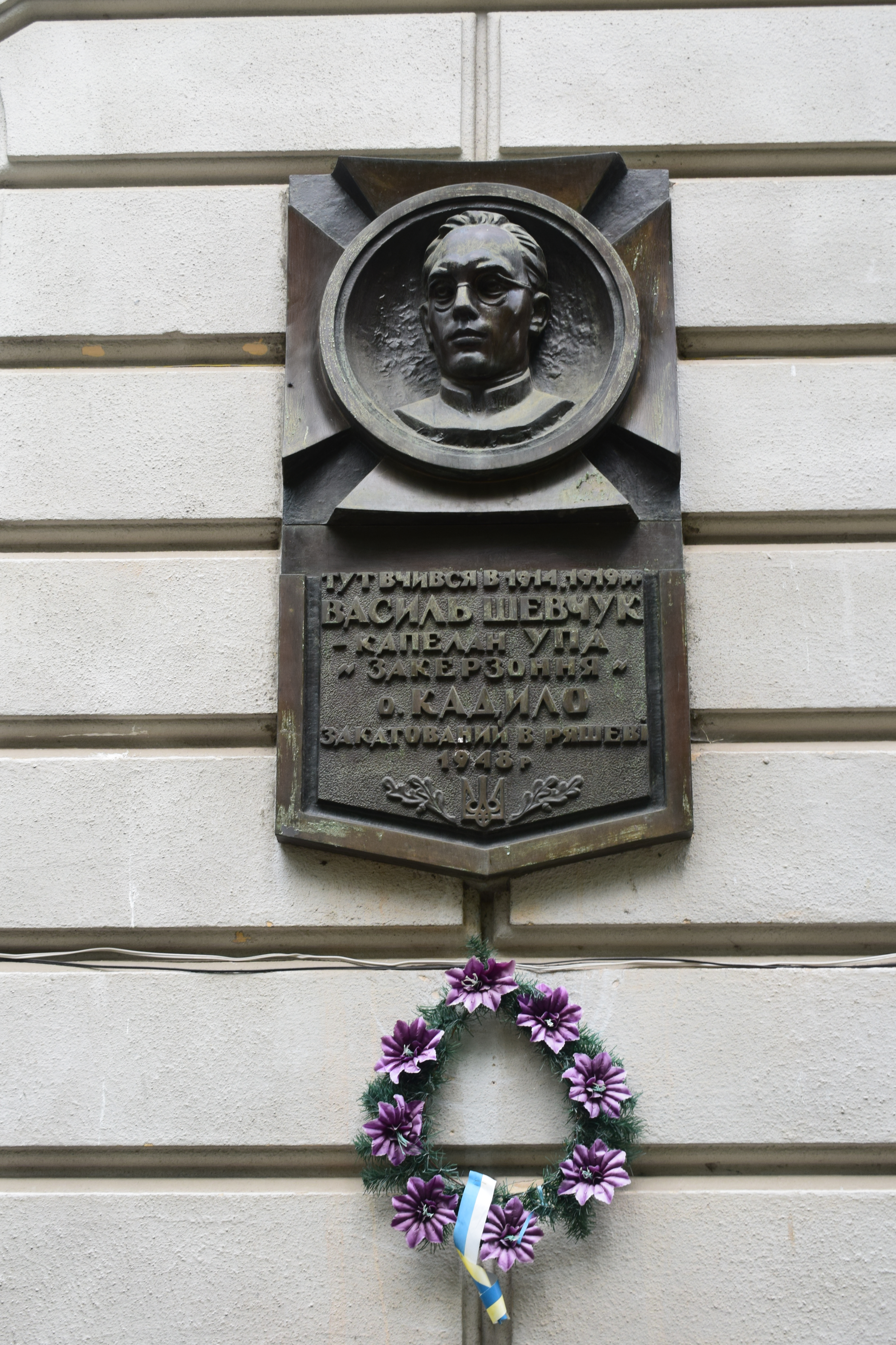 Будинок гімназії, Дрогобич, вул. Івана Франка, 24